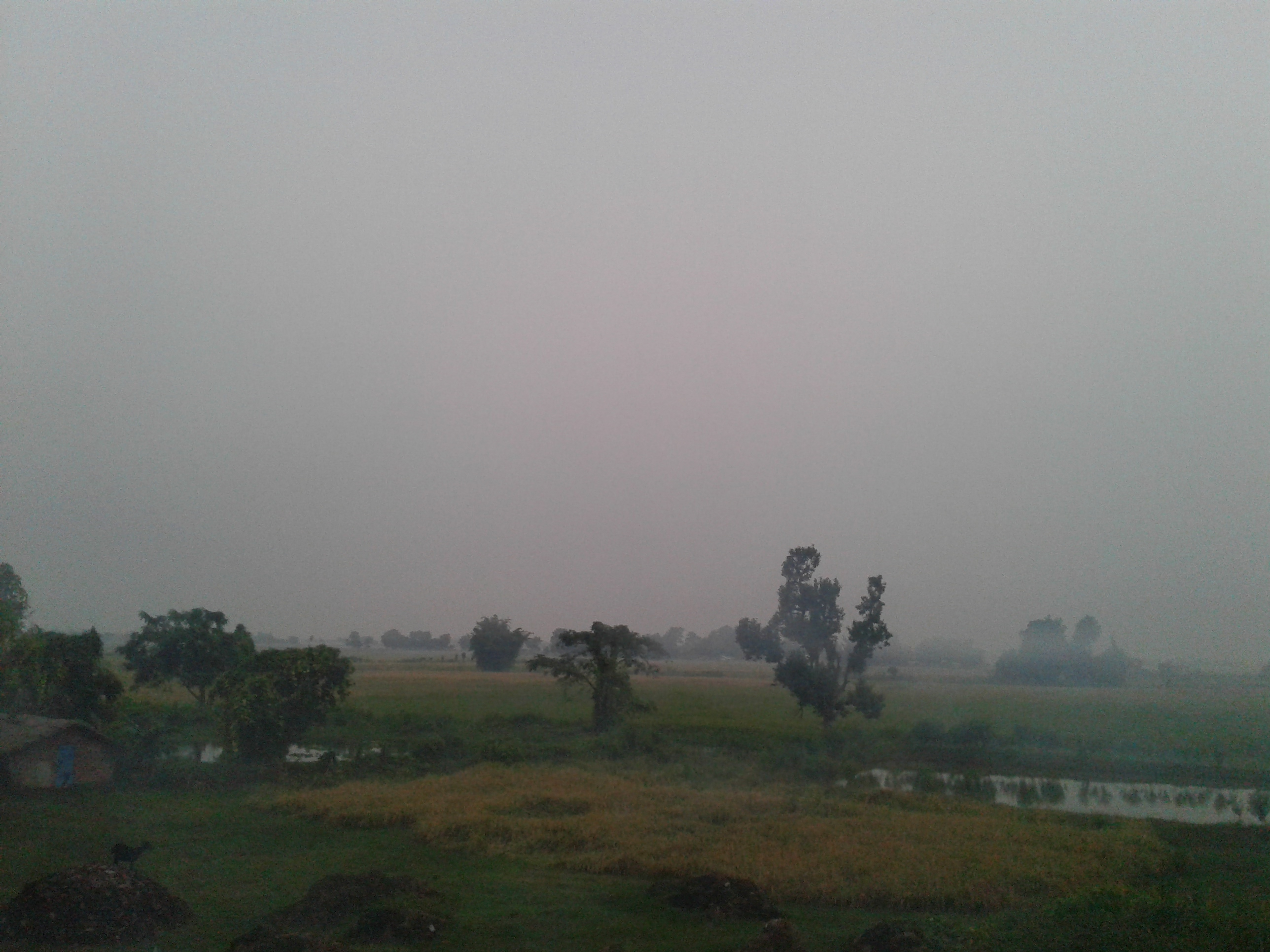 kopawa village